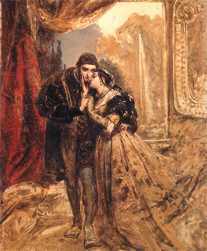 Zygmunt August z Barbarą na dworze radziwiłłowskim w Wilnie (szkic)